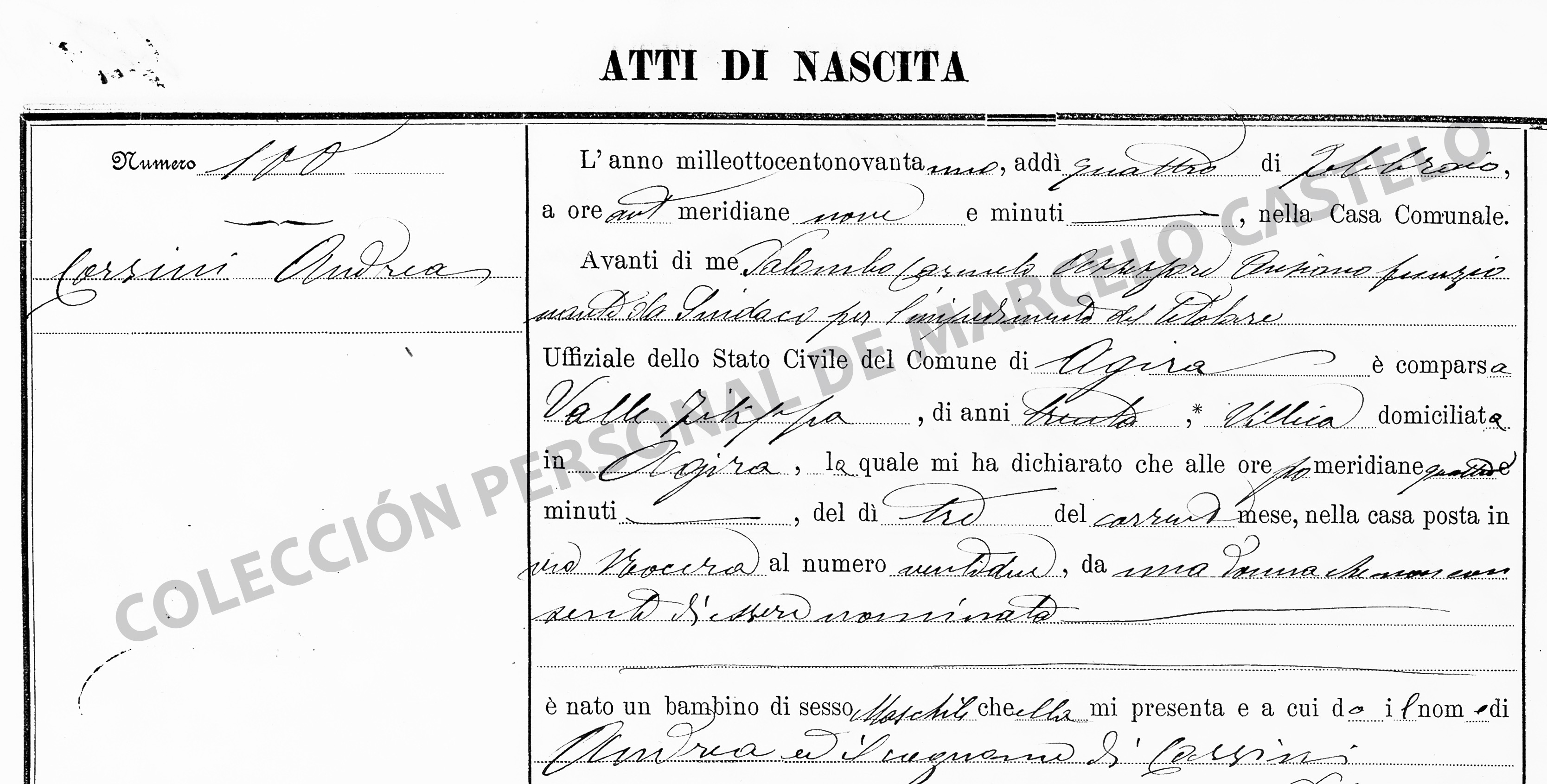 Imagen Parcial del Acta de Bautismo